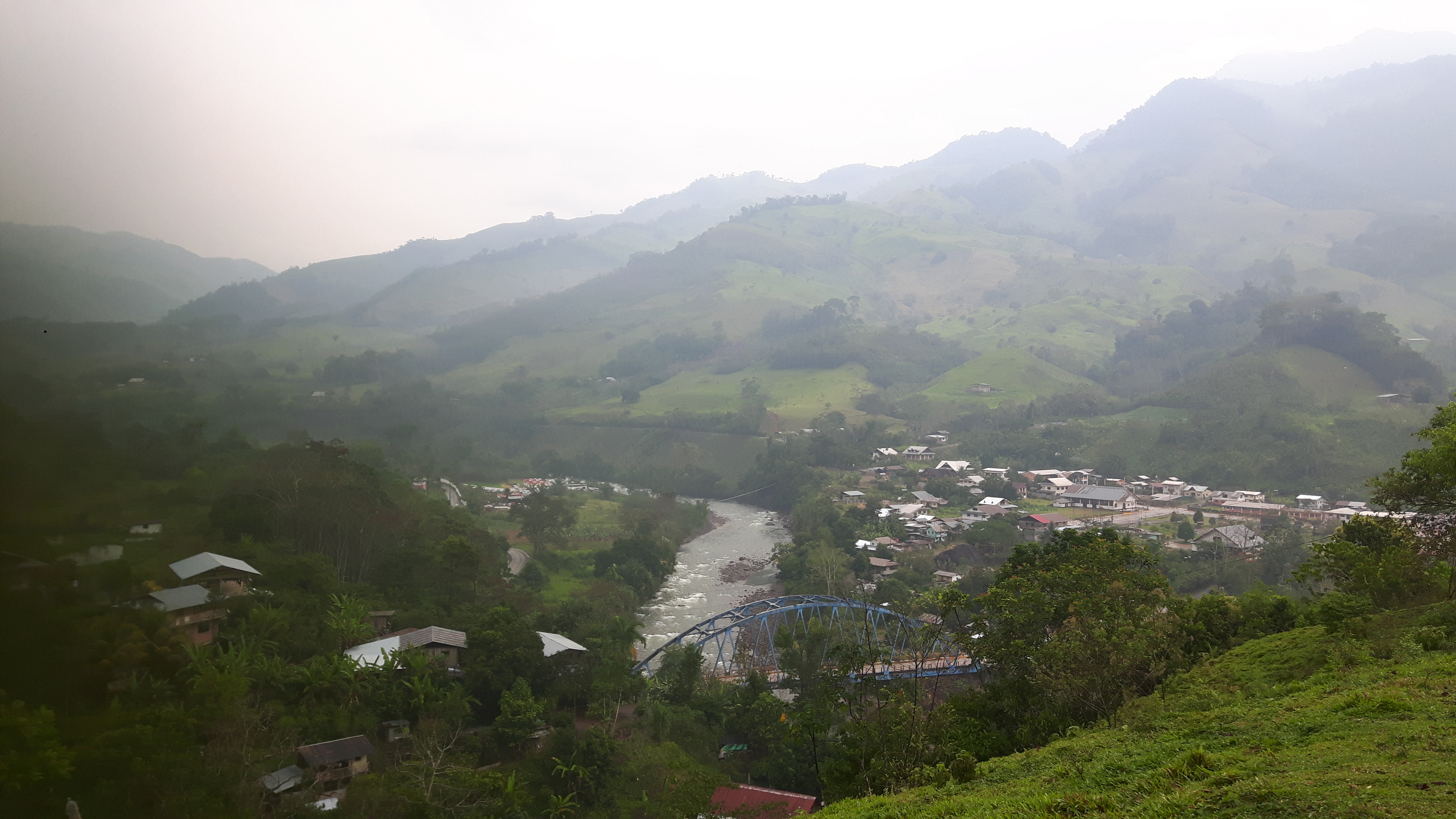 Pozuzo